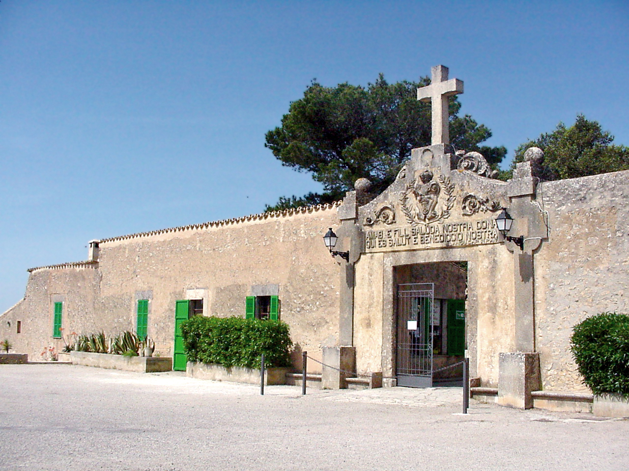 Santuari La Cura. A monastery in Randa, Mallorca.